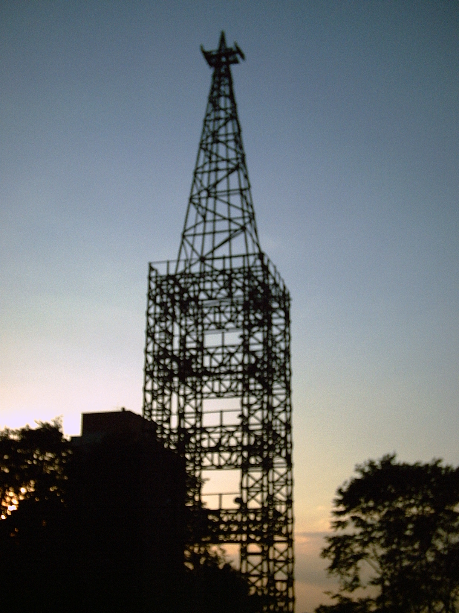 Antigua torre del cable áereo de Manizales (Construida en 1922, restaurada en 1984). Old aerial cable car tower in Manizales (build in 1922, restored in 1984).